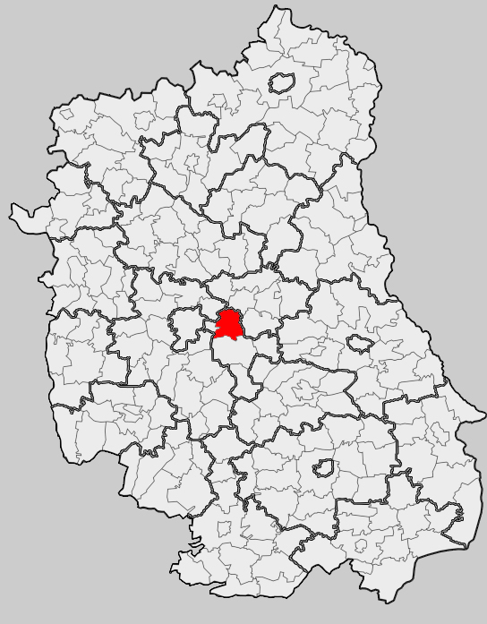 Map of gmina Mełgiew, Świdnik county, Lublin voivodship Mapa gminy Mełgiew, powiat świdnicki, województwo lubelskie